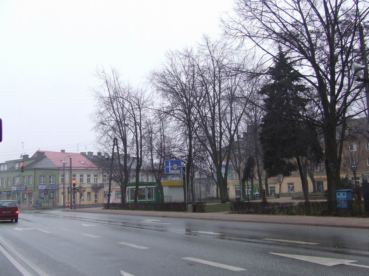 Rynek w Zambrowie